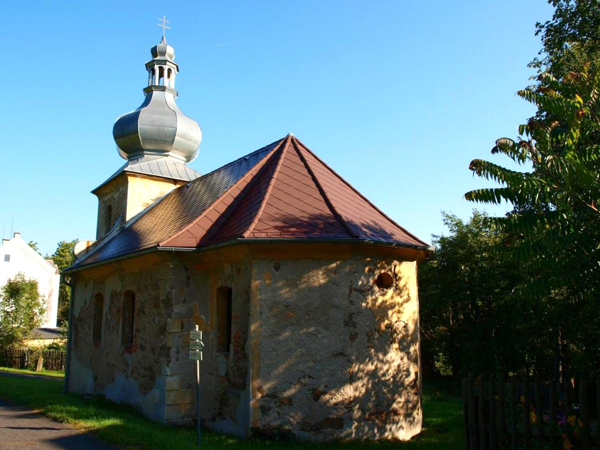 Svinov, okres Karlovy Vary